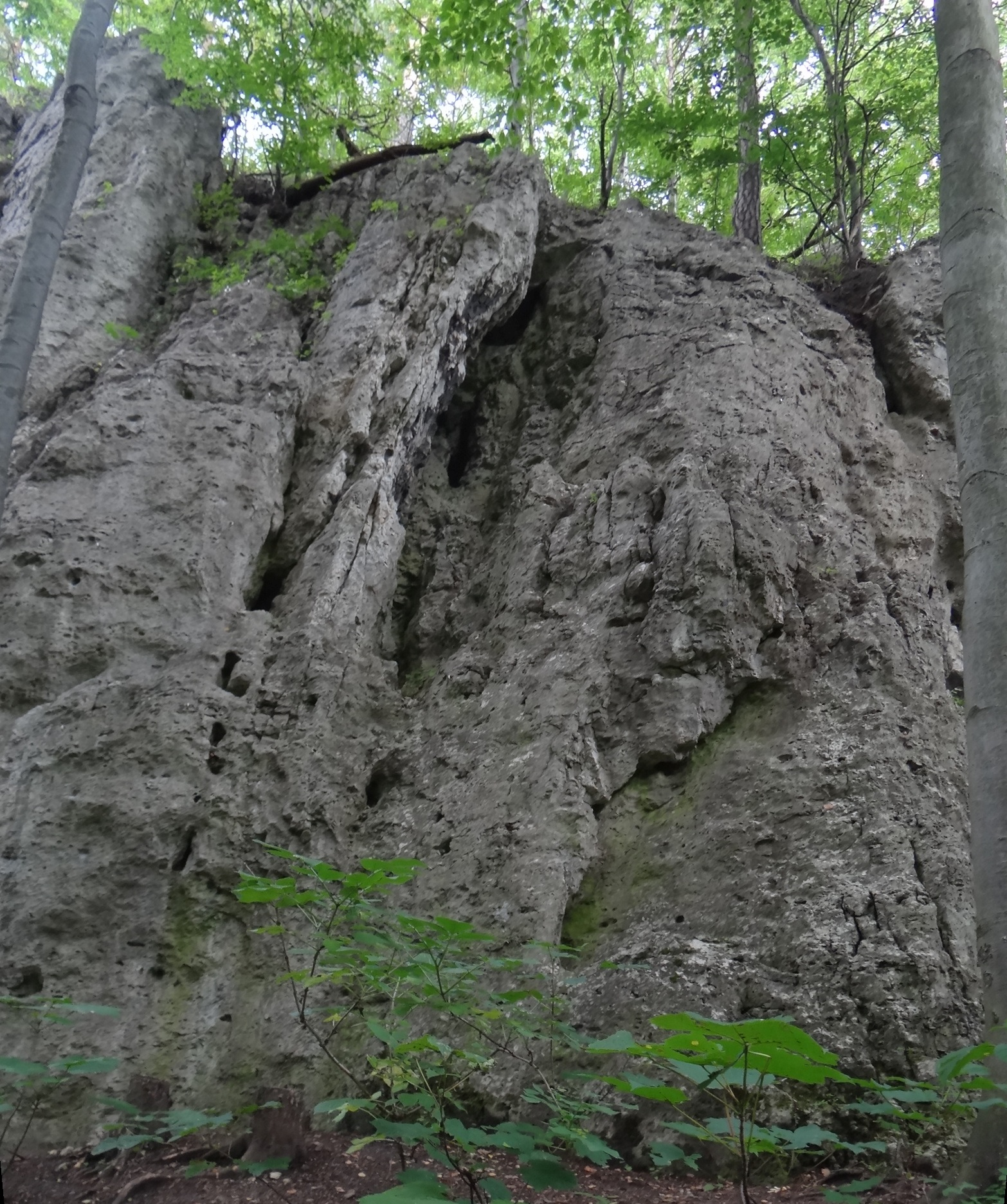 Skała Organy w Wąwozie Ostryszni. Widoczny otwór Schronisko Pionowego w Ostryszni